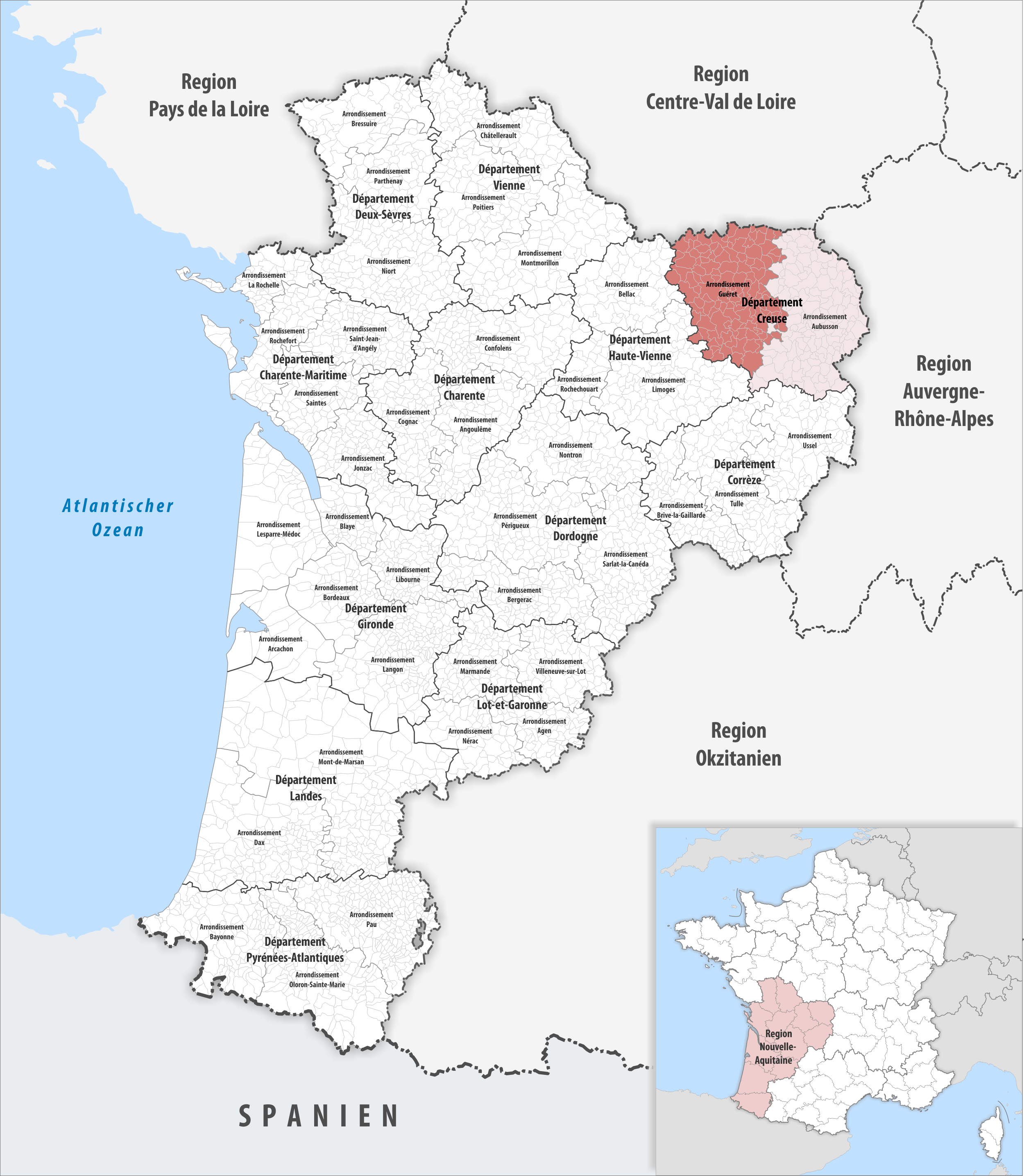 Lage des Arrondissements Guéret